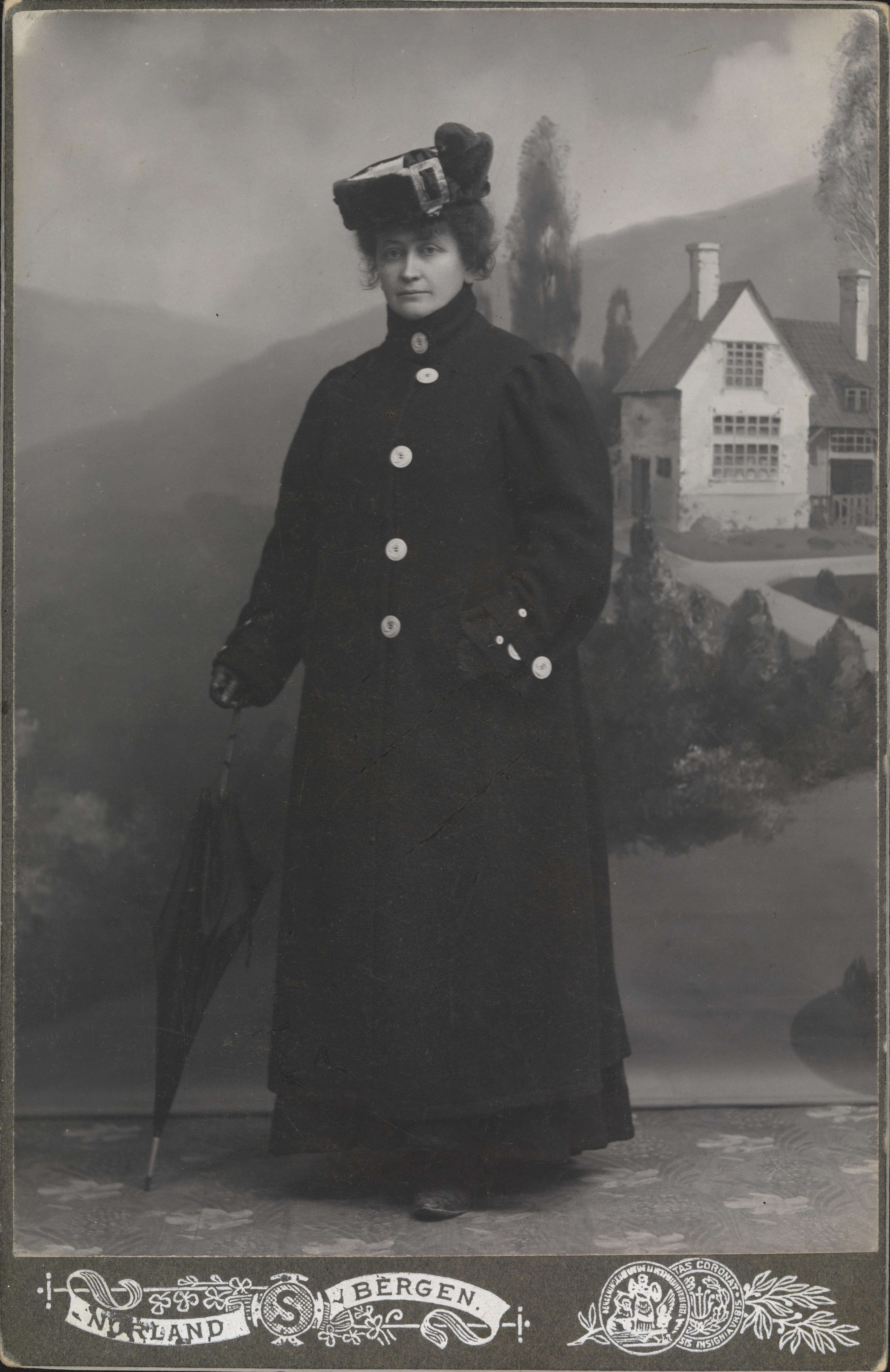 Bildet er hentet fra Nasjonalbibliotekets bildesamling Depicted person: Garborg, Hulda